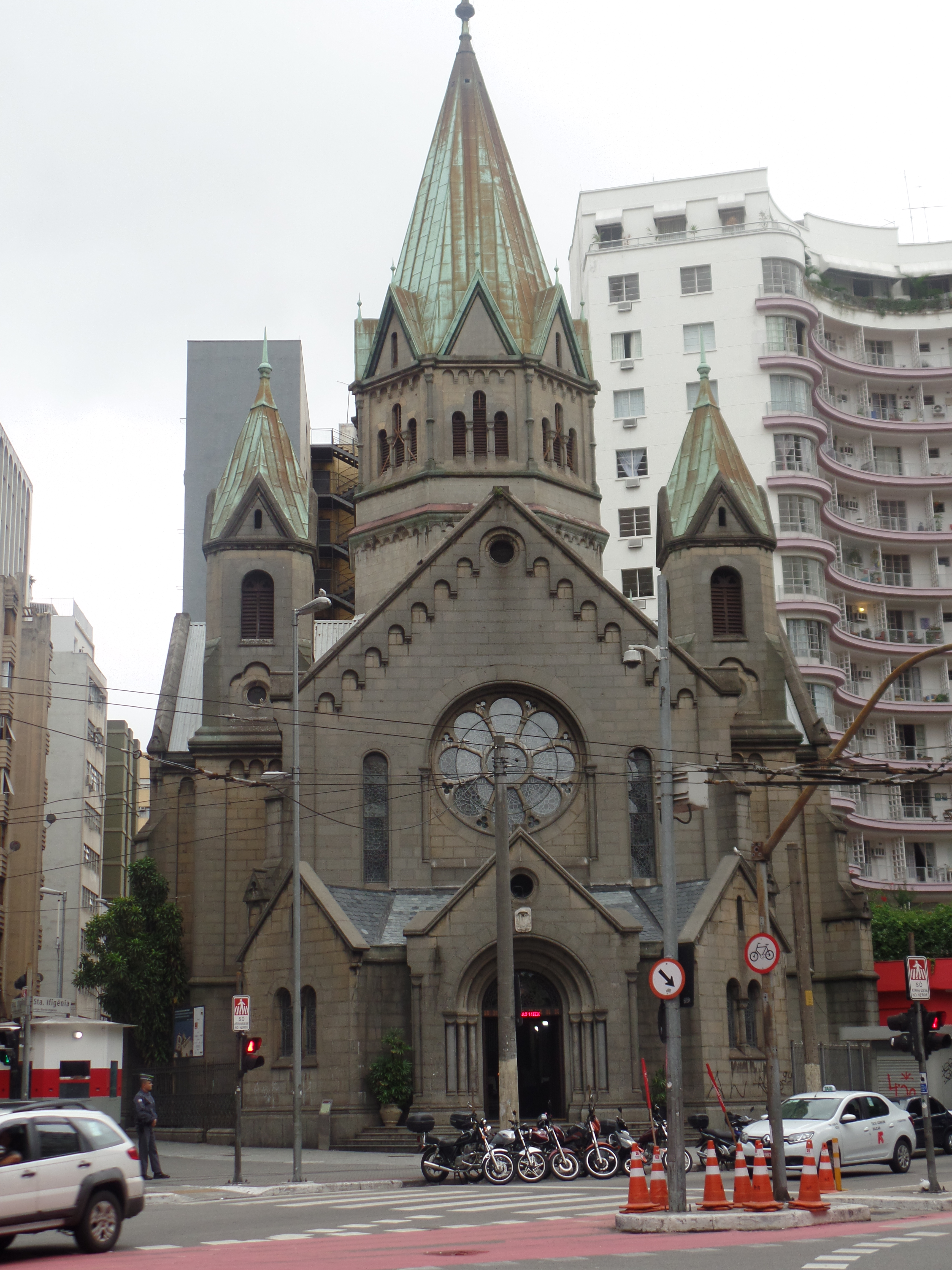 Santa Ifigênia, São Paulo - SP, Brazil